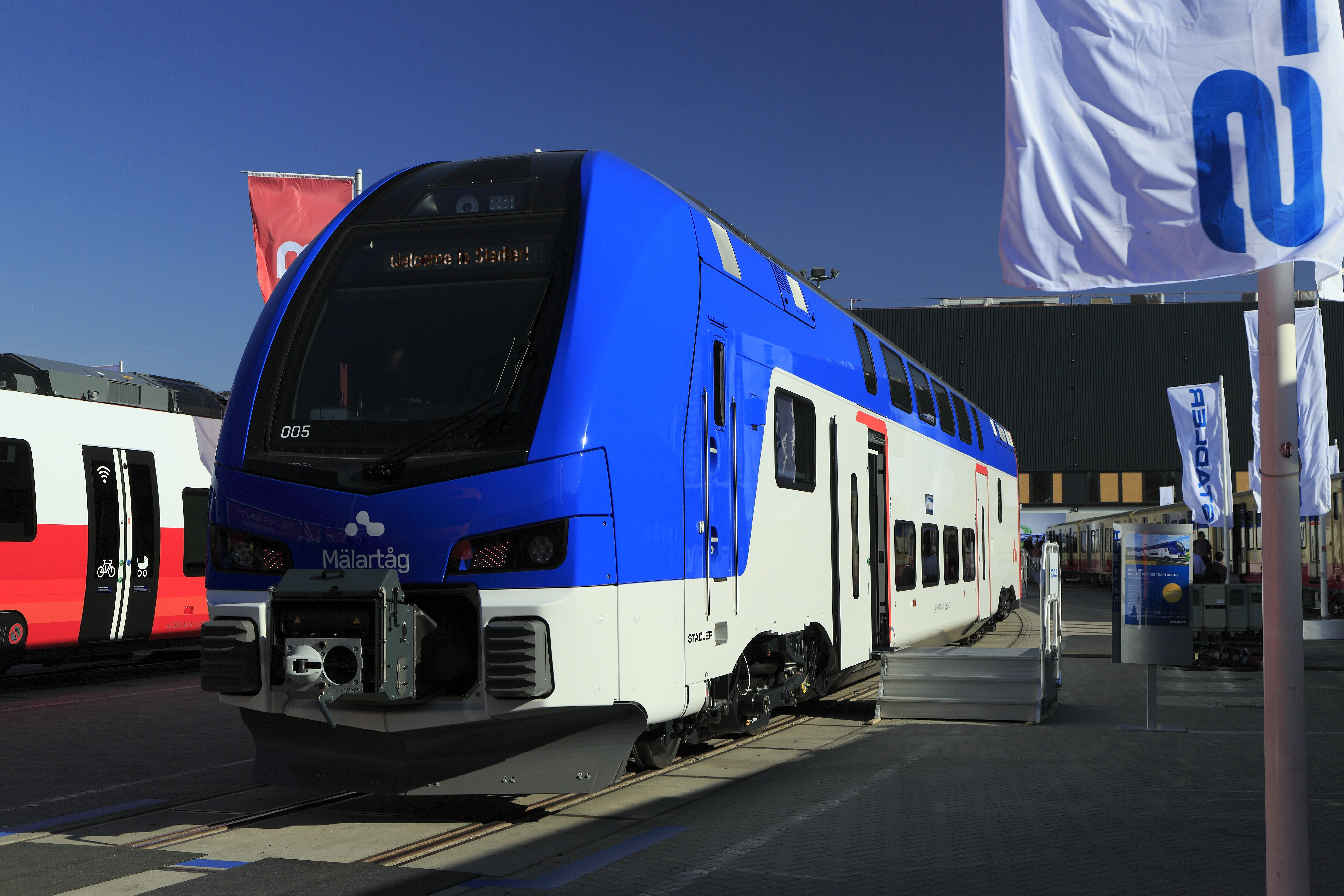 Vierteilige Doppelstockeinheit für Schweden, Fahrzeughalter wird das Leasingunternehmen Transitio. Eingesetzt werden sollen die Einheiten auf dem Mälardalen-Netz westlich von Stockholm. Die Einheiten nutzen das schwedische Fahrzeugumgrenzungsprofil gut aus, sie sollen mit Temperaturen bis –40°C und Schneehöhen bis 80 cm klarkommen. Für Schweden typisch sind die Abdeckungen der Scharfenbergkupplungen, die das Eindringen von Schnee verhindern. Ohne Schutz vor Schnee und Vereisung sind spielarme Mittelpufferkupplungen nicht wintersicher.